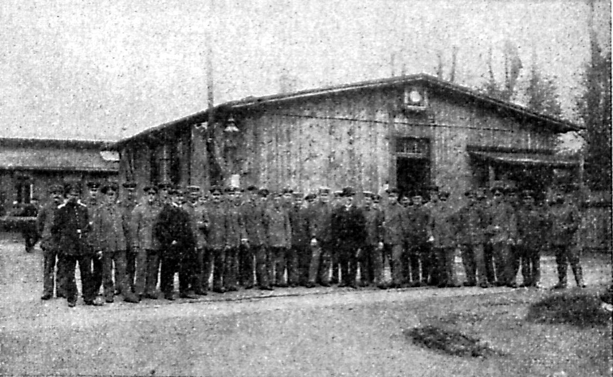 Abmarsch zur Stadtbesichtigung mit Mitgliedern des Verkehrs-Vereins